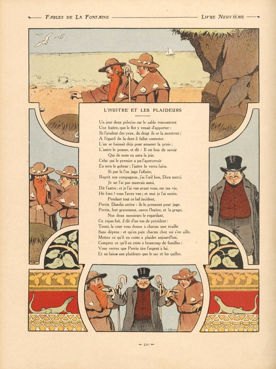 Fables de La Fontaine illustrées par Benjamin Rabier : L'huitre et les plaideurs.